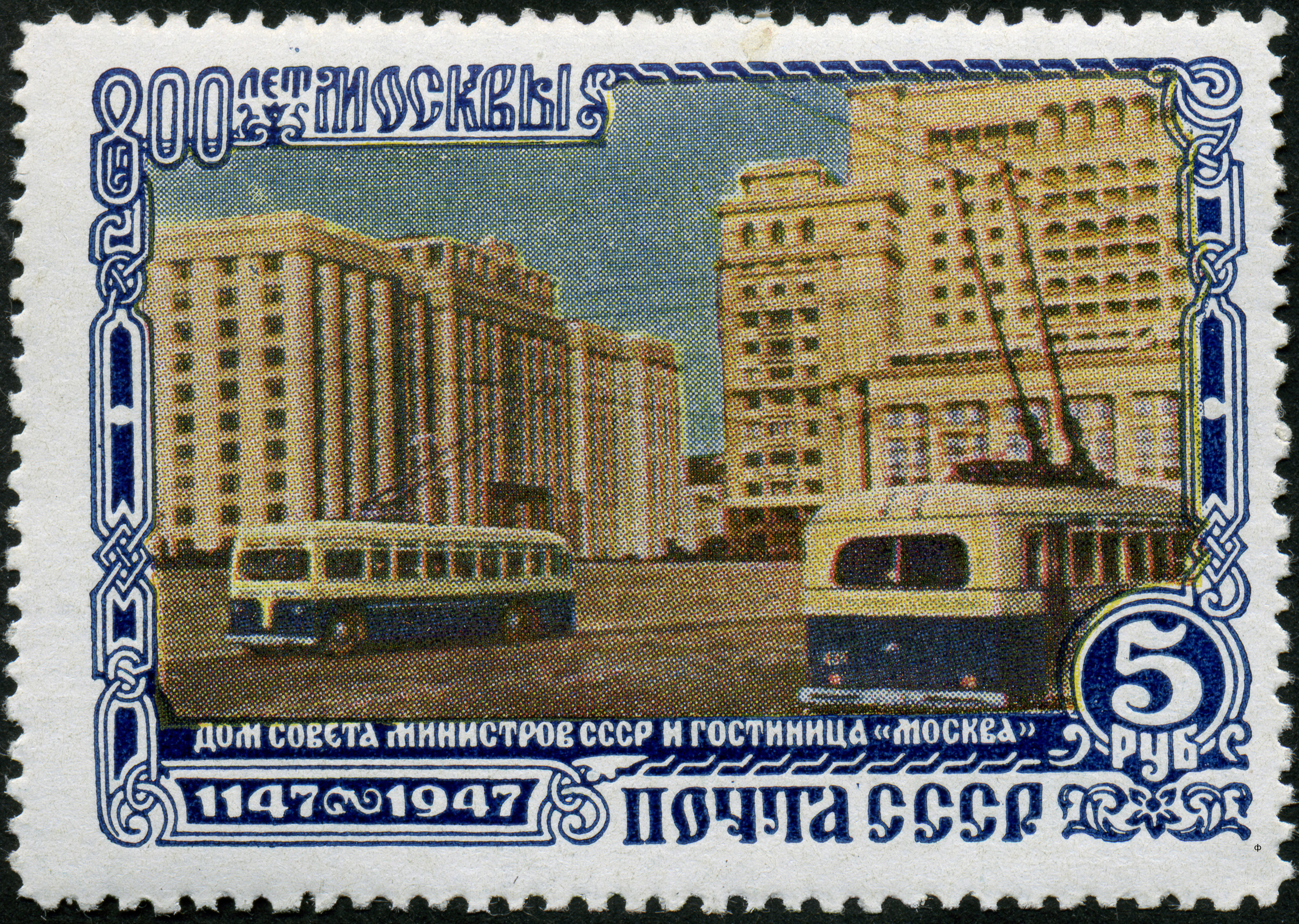 Марка СССР